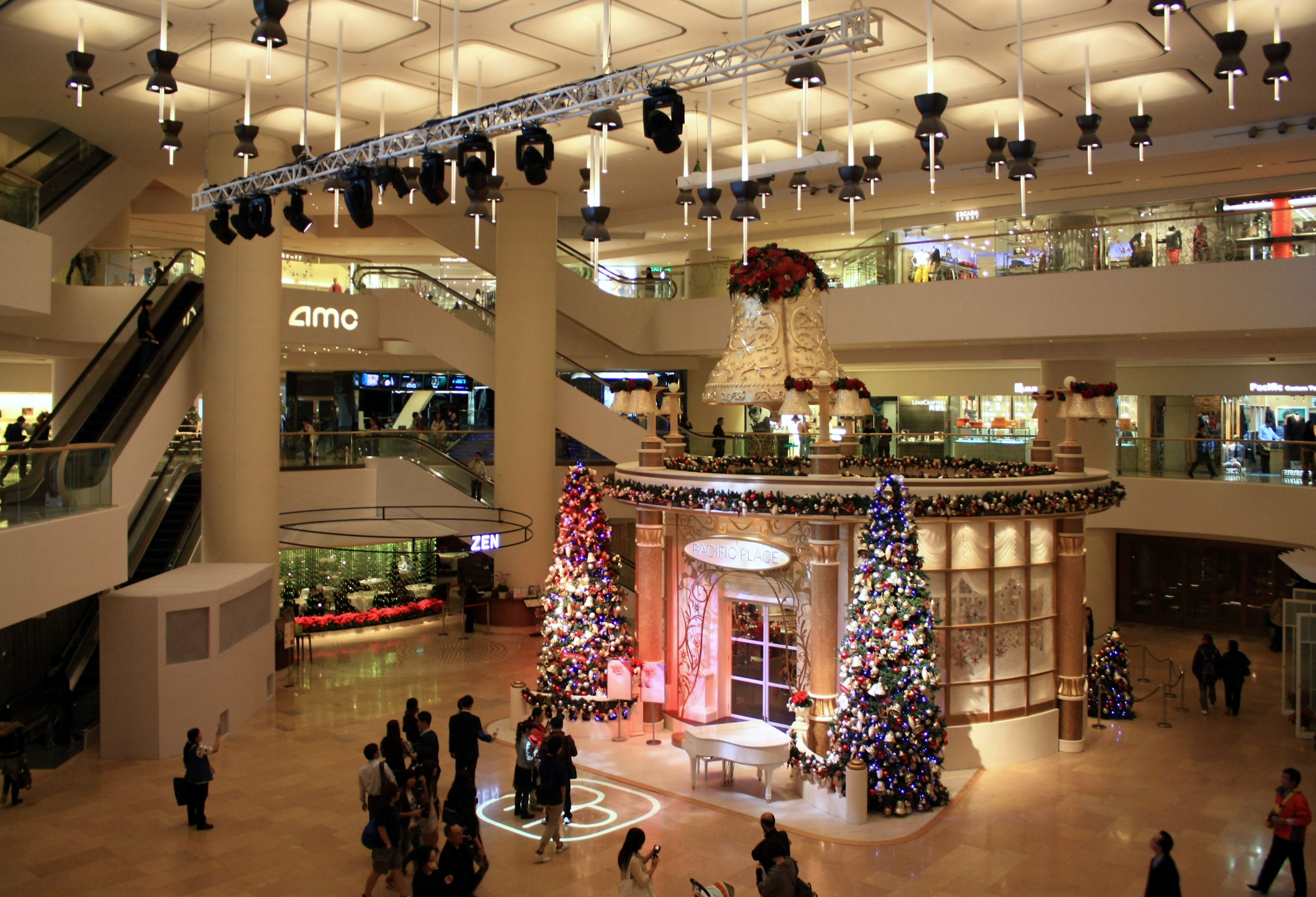 Pacific Place 太古廣場